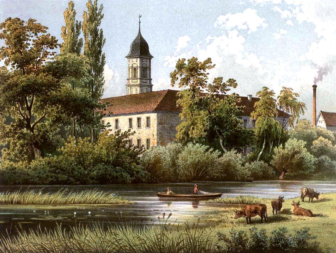 Schloss Hemsendorf, Lithografie aus dem 19. Jahrhundert